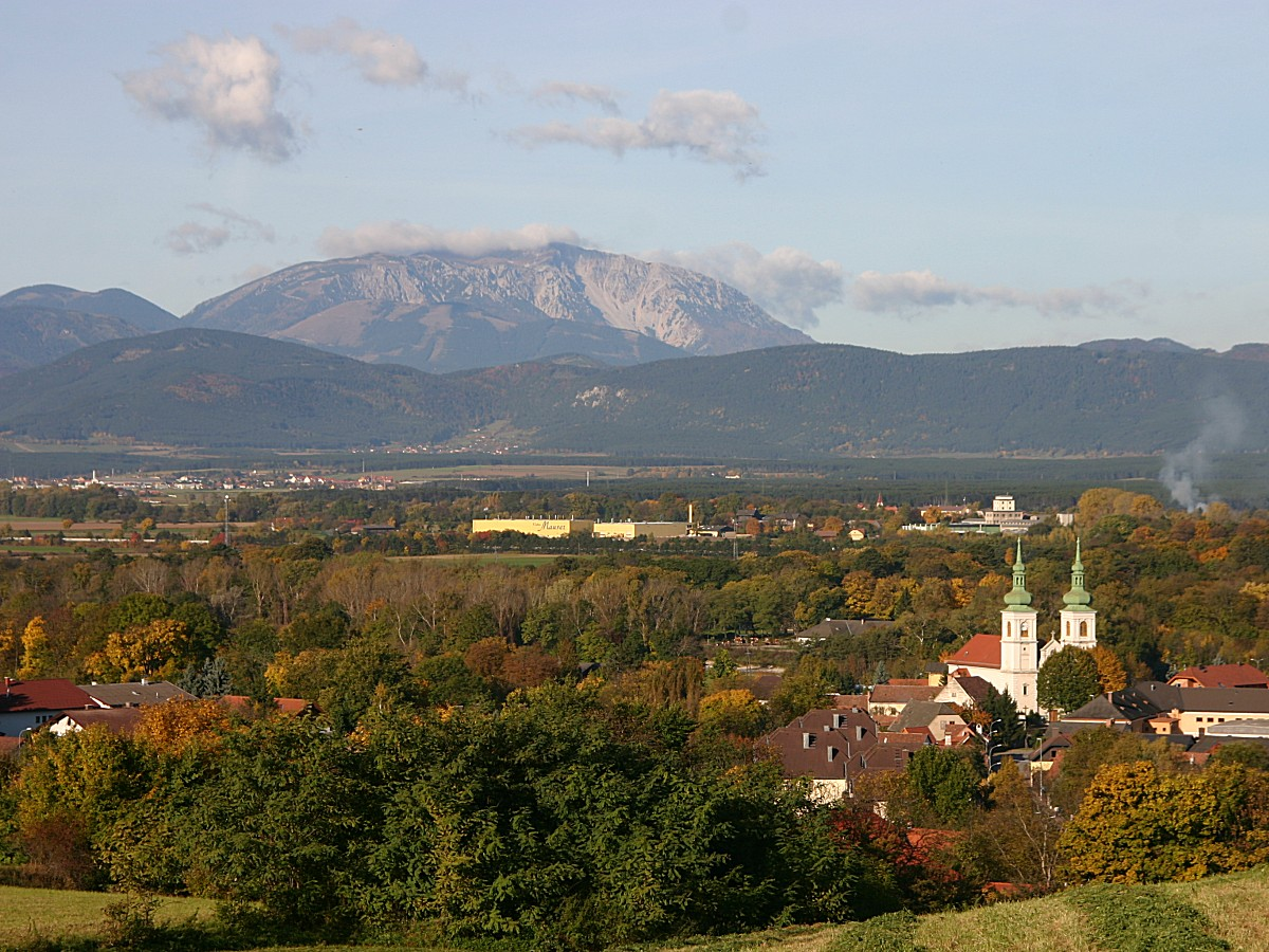 Schwarzau am Steinfelde mit dem Schneeberg